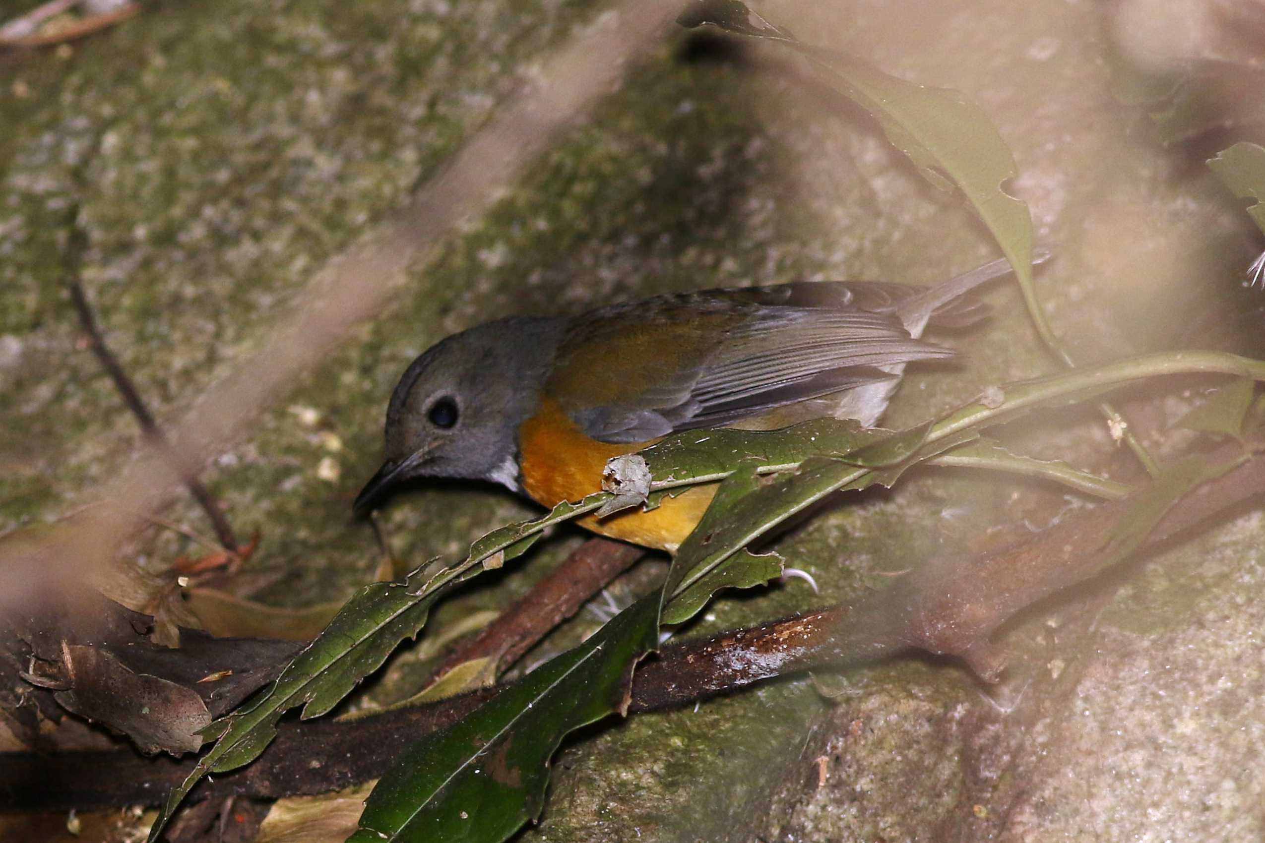 Swinnerton's Robin, Swynnertonia swynnertoni, Seldomseen, Vumba, Zimbabwe